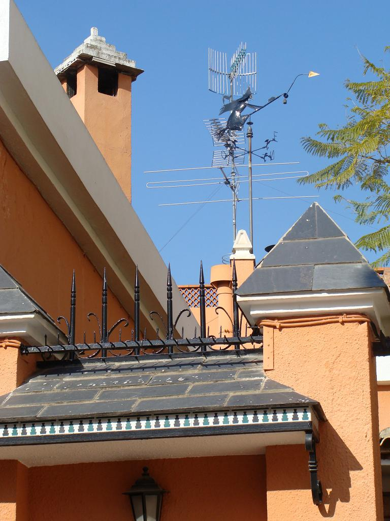 La figura de una bruja y su escoba marca la dirección del viento en una veleta de Alcudia de Carlet (Provincia de Valencia)